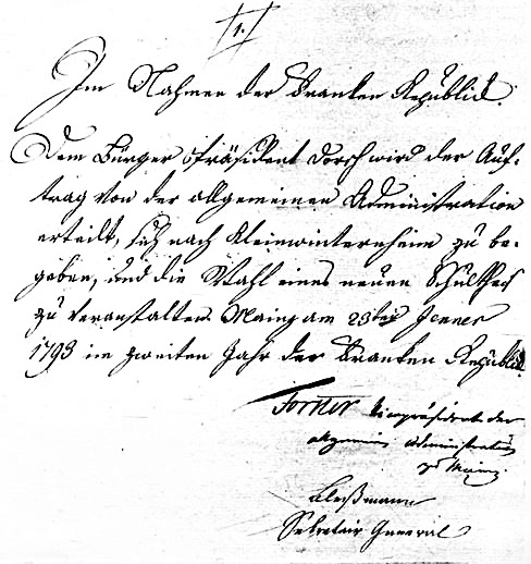 Verfügung der Revolutionäre Georg Forster (1754-1794) und Johann Christoph Bleßmann (1760-1836) zur Wahl eines Schultheißen in Klein-Winternheim, 1793